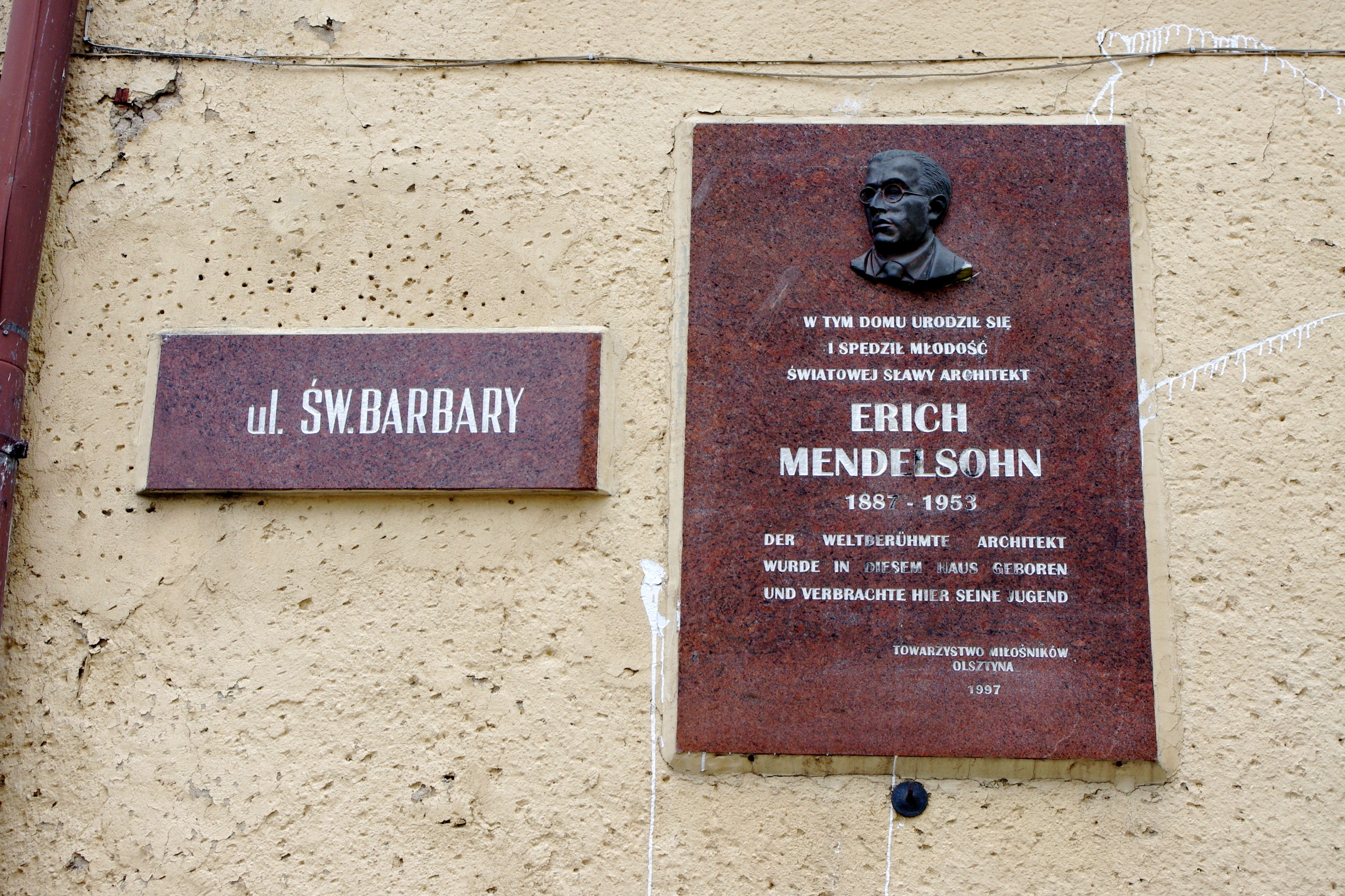 Tablica upamiętniająca niemieckiego architekta Ericha Mendelsohna (1887-1953) na domu jego urodzenia w Olsztynie